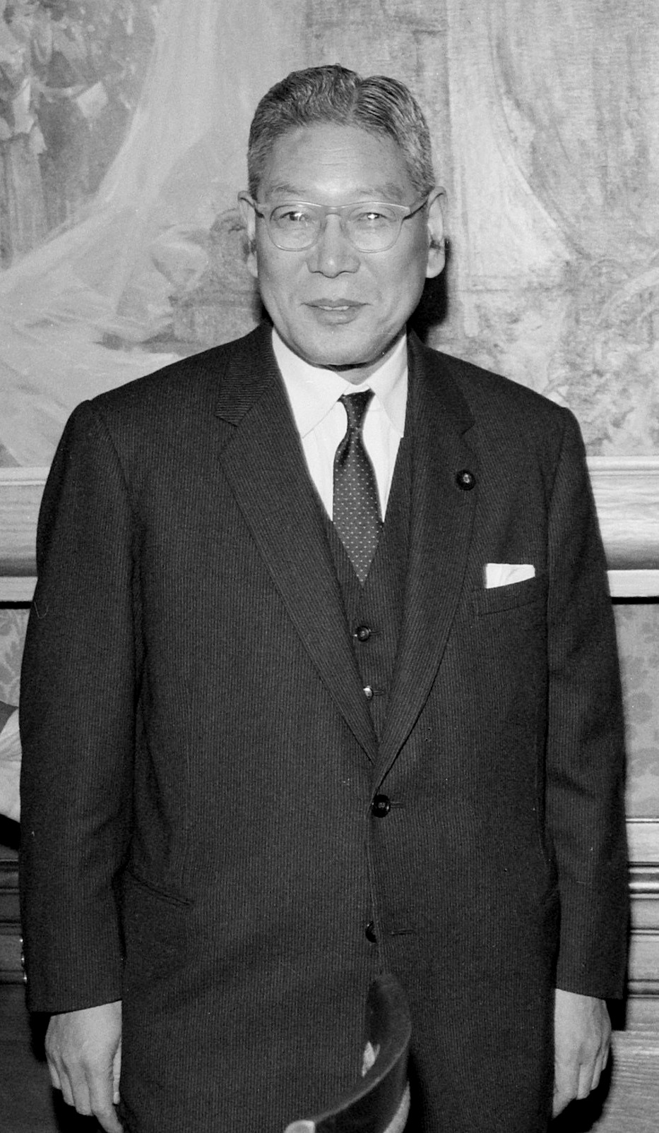 Premier Ikeda voor het schilderij van de huwelijksinzegening van prinses Juliana en prins Bernhard door Pieter van der Hem